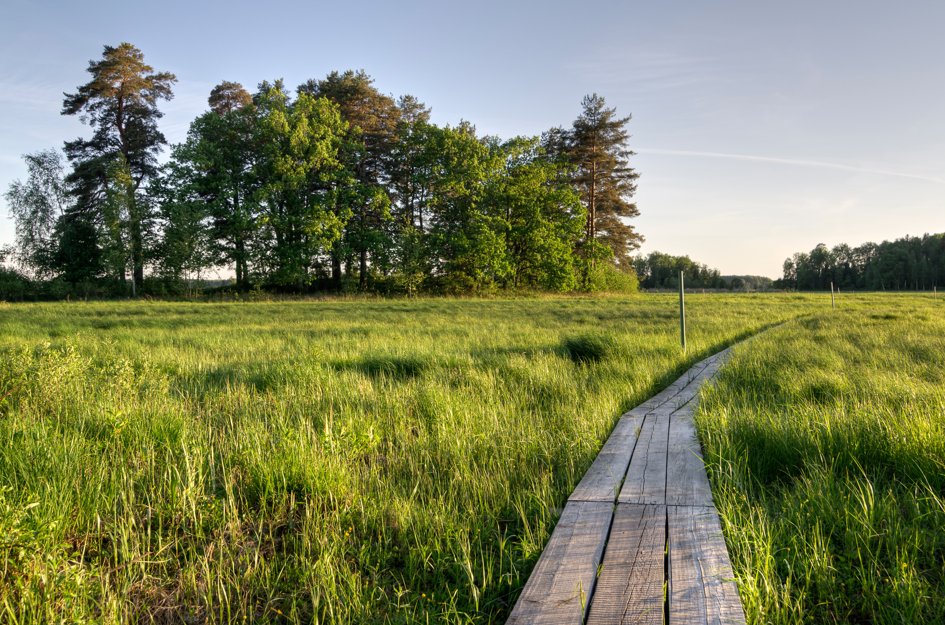 Kaiu järve matkarada, Kääpa maastikukaitseala